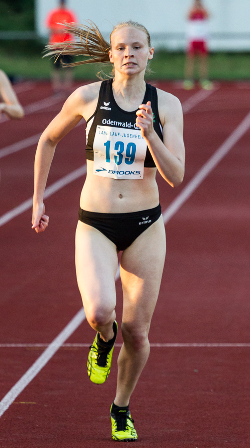 Abendsportfest des TSV Pfungstadt am 1. Juli 2015.